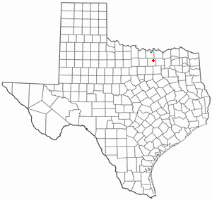 Krugerville, TX